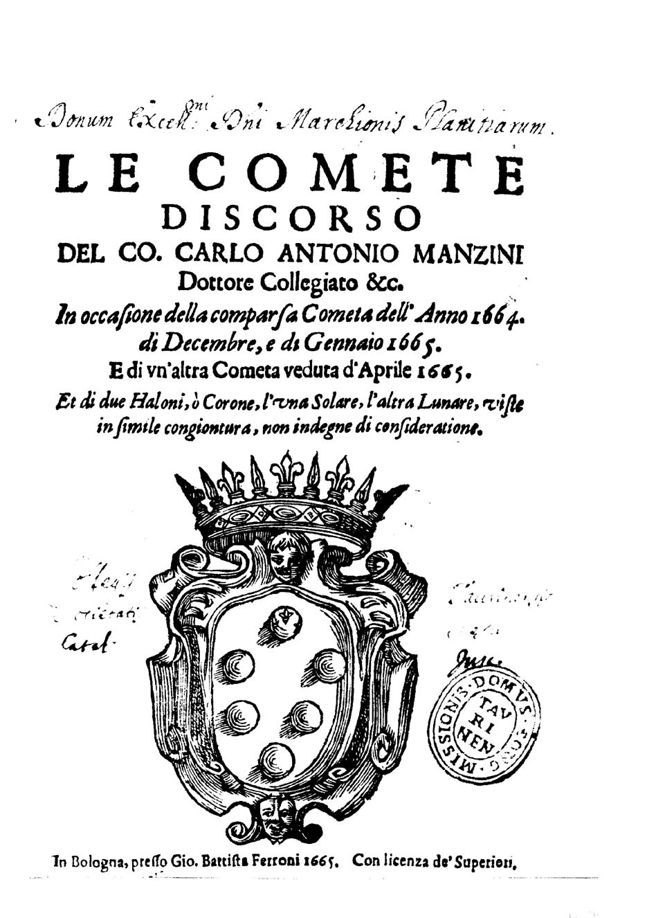 Frontespizio